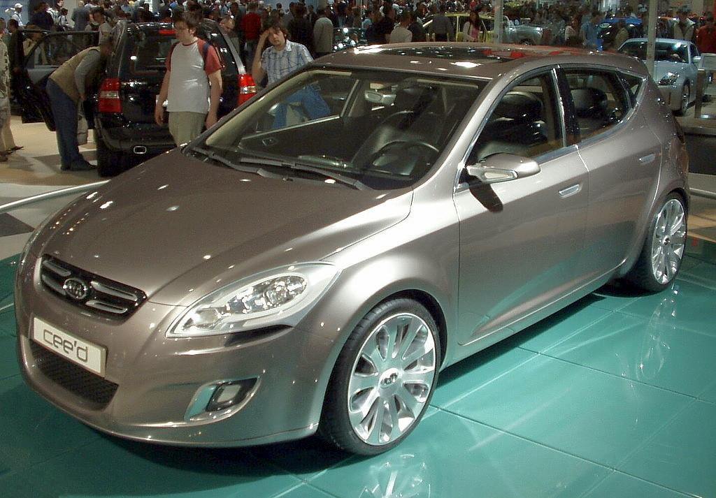 Kia cee'd Concept 2006